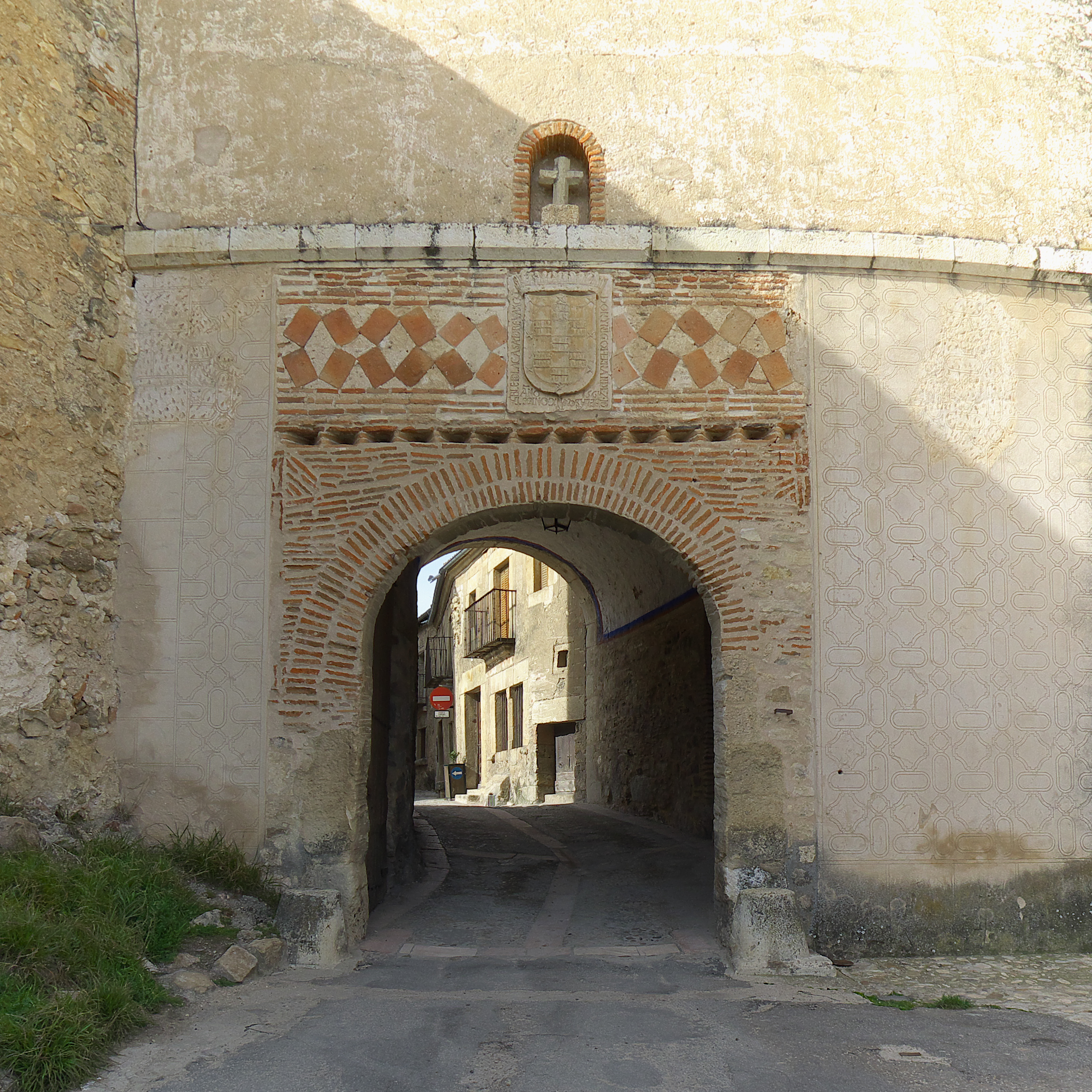 A principios del siglo XVI, el Señorío de Pedraza lo ostentó el Condestable de Castilla, Ínigo Fernández de Velasco y Mendoza, que restauró la única puerta de la villa.